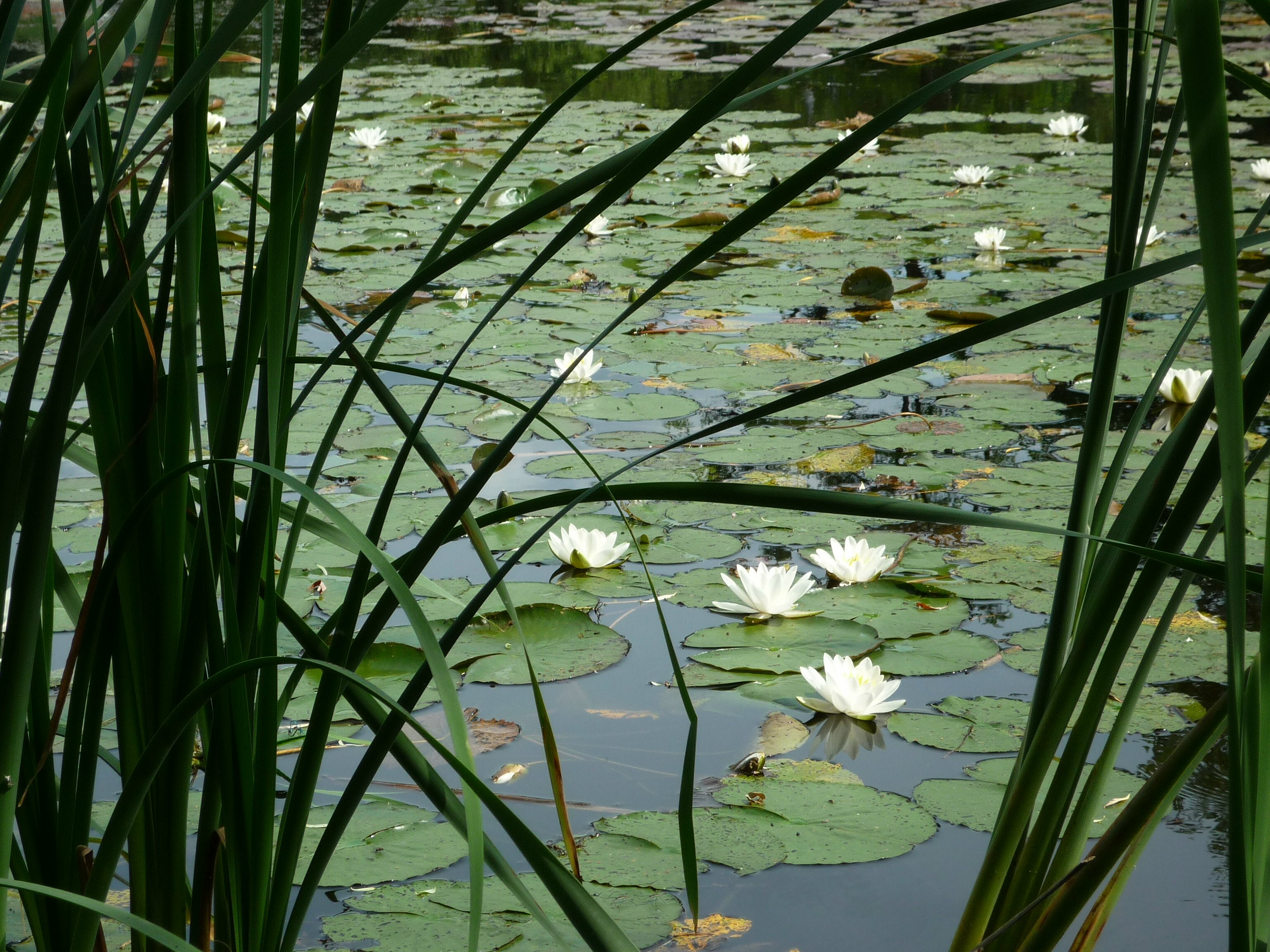 Seerosen, Schwimmblattgesellschaft